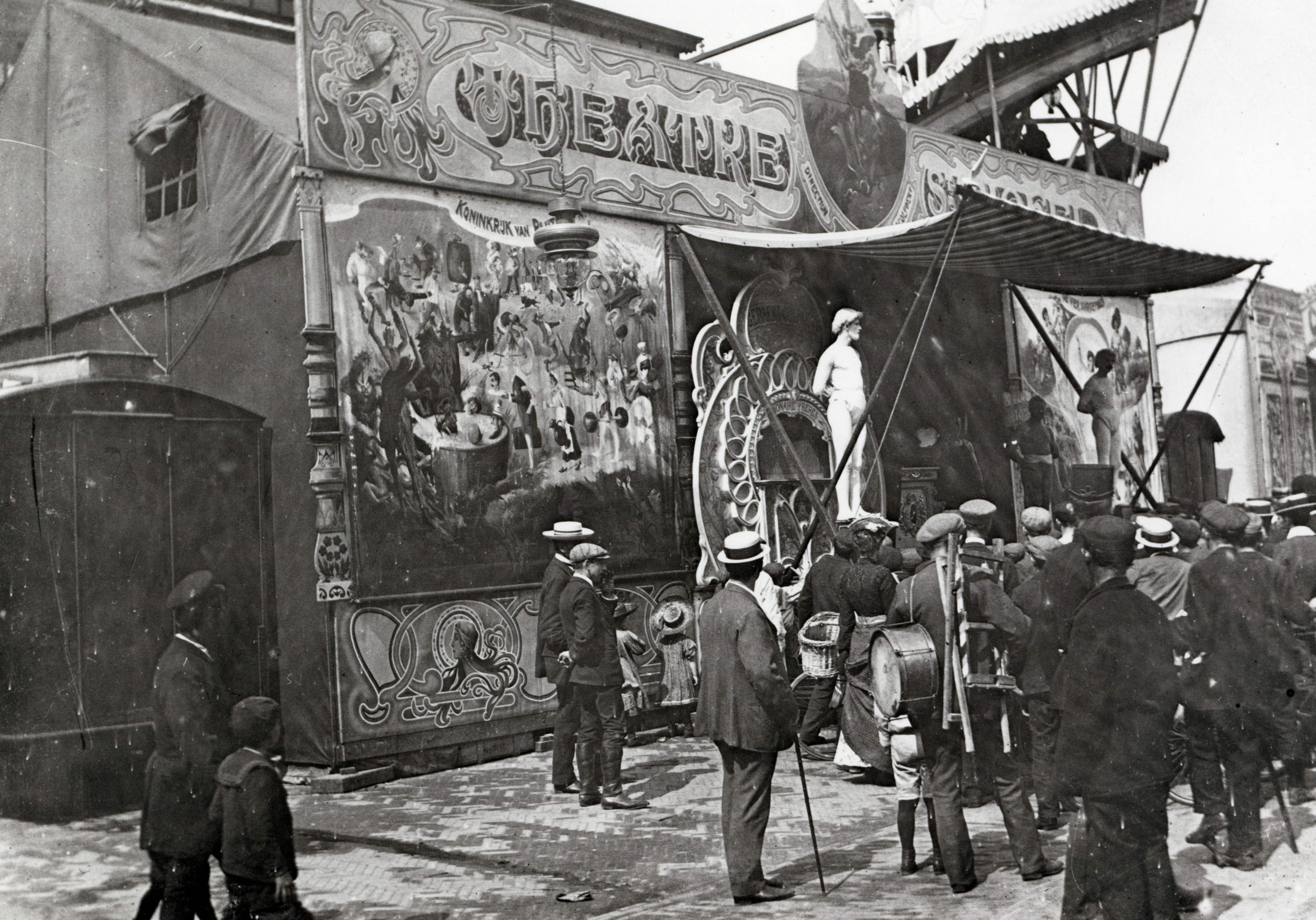 Kermis in 1908 op Vredenburg te Utrecht met zichtbaar de worsteltent Theatre St. Michel.